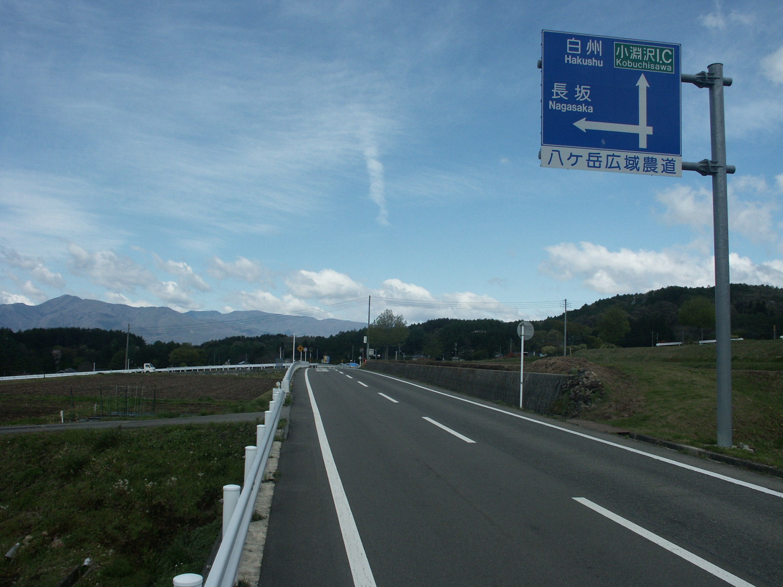 八ヶ岳広域農道北杜市大泉町谷戸付近（小淵沢方面を撮影）